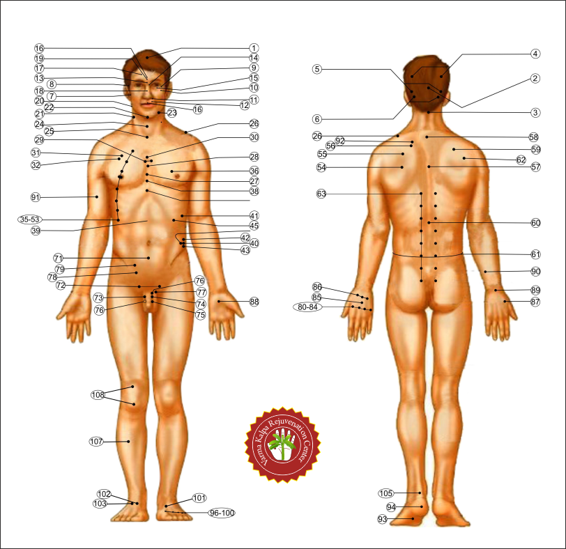 வர்ம புள்ளிகள்